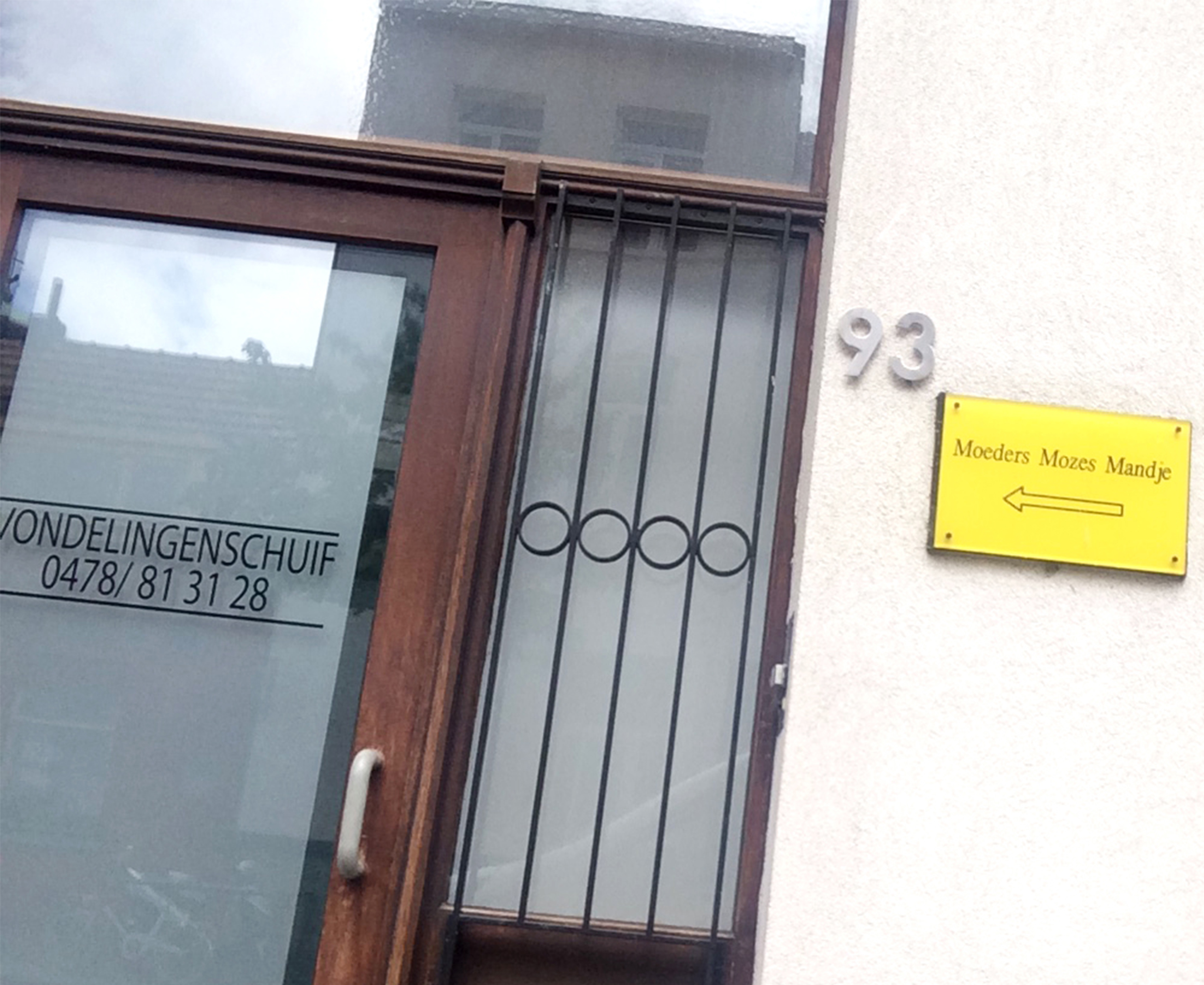 Dit is een foto van de vondelingenschuif van Moeders voor Moeders in Antwerpen-Borgerhout.